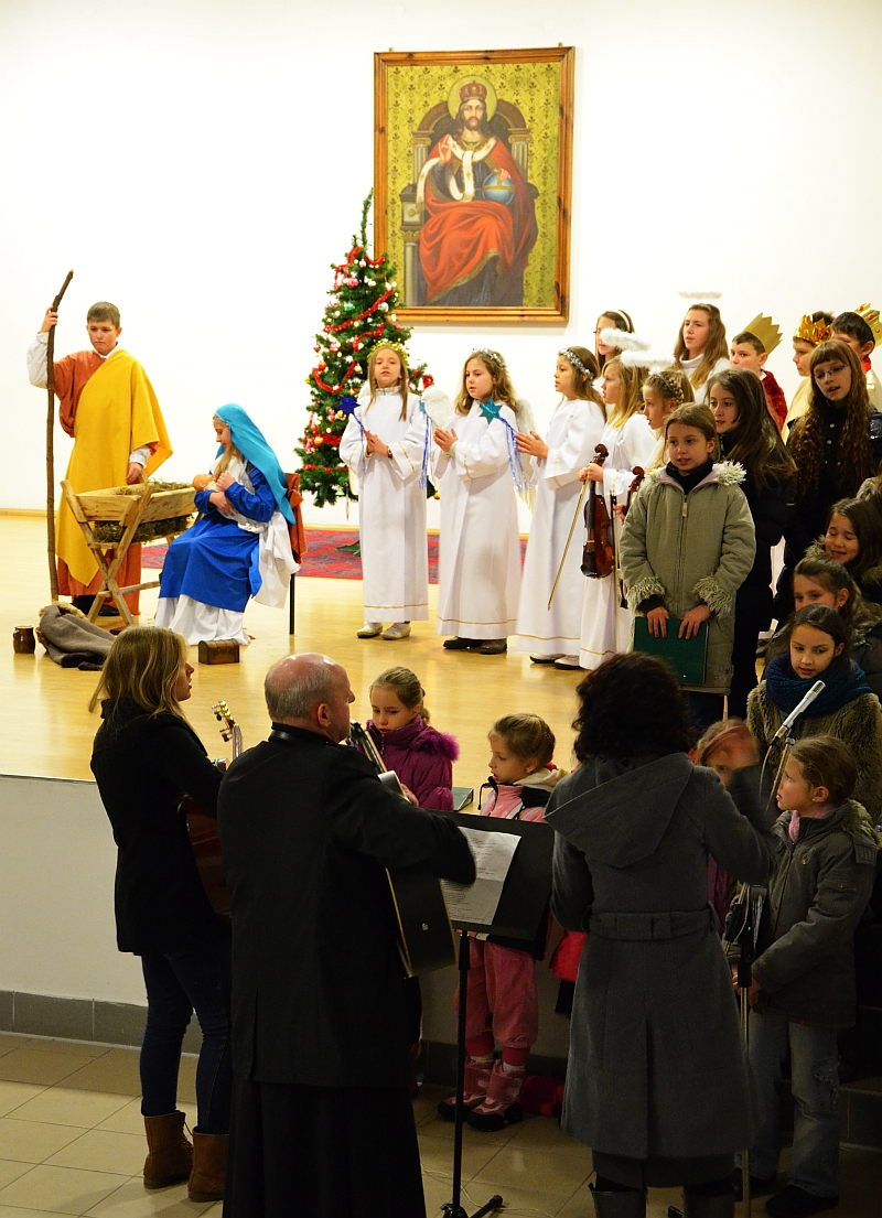 Feste der Heiligen drei Könige in Sanok